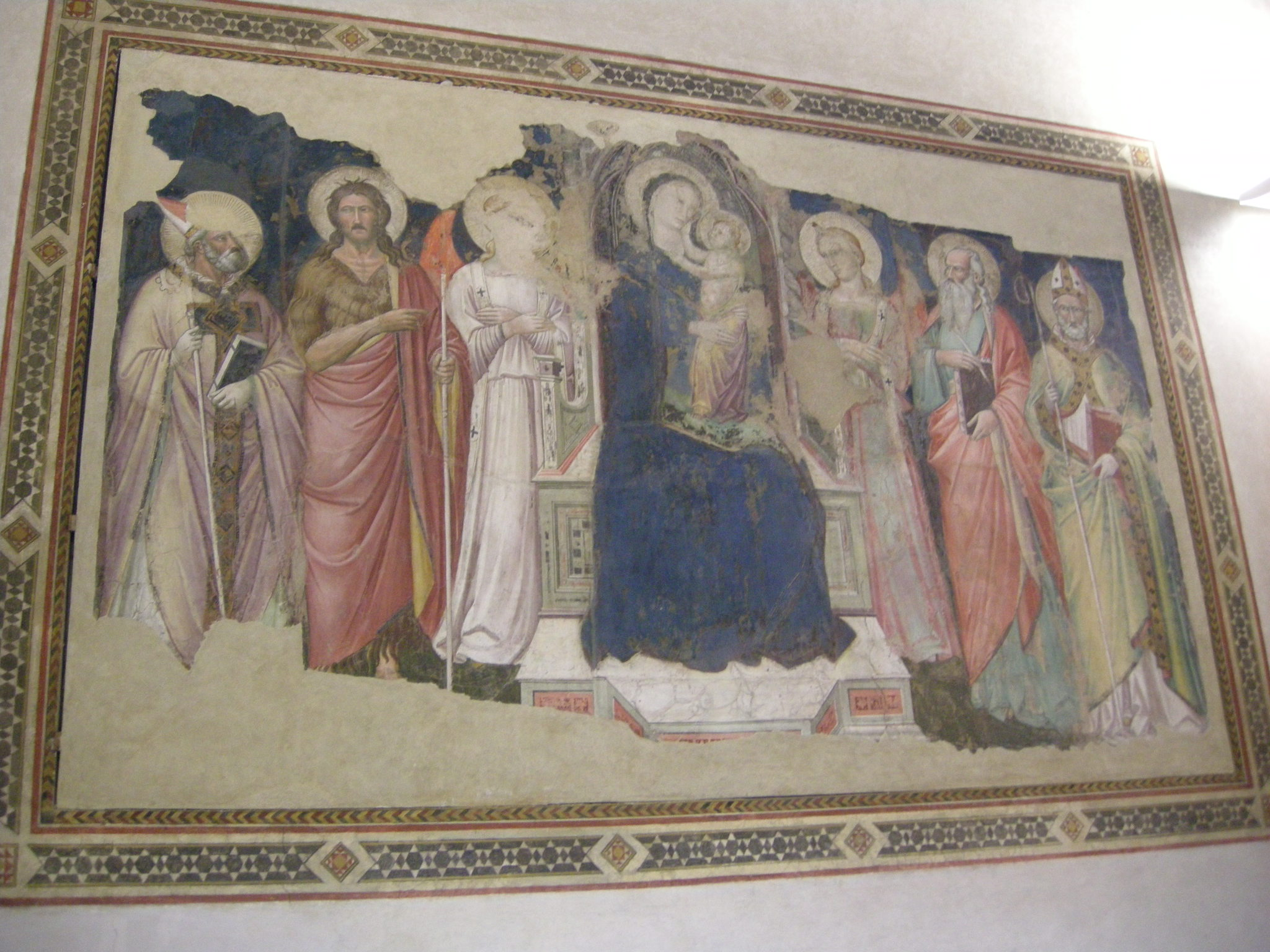 Firenze, Palazzo dell'arte della seta, Bernardo Daddi o a Niccolò di Pietro Gerini, Vergine col Bambino in trono e sei santi (1395-1400)